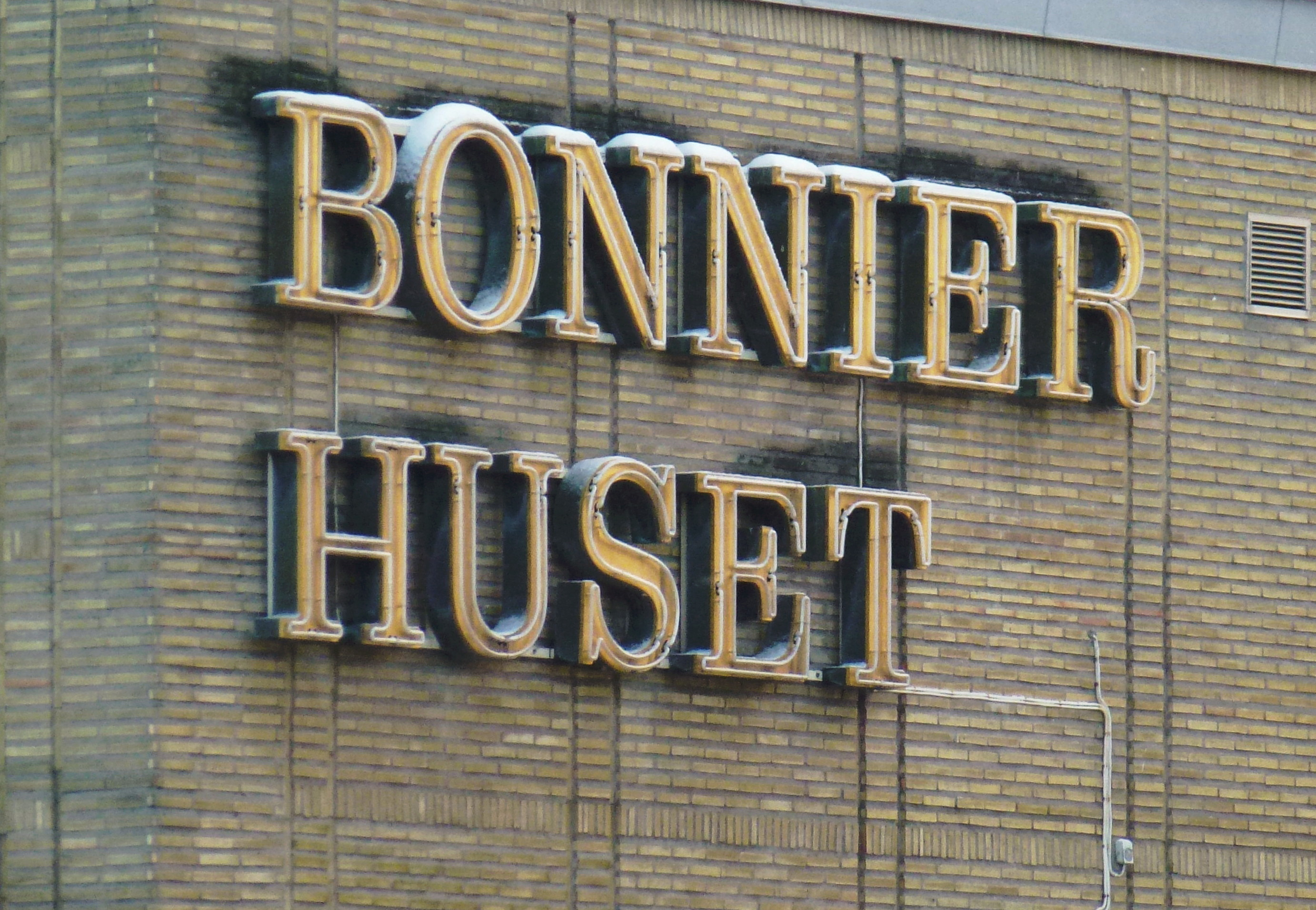 Bonnierhuset, neonskylt